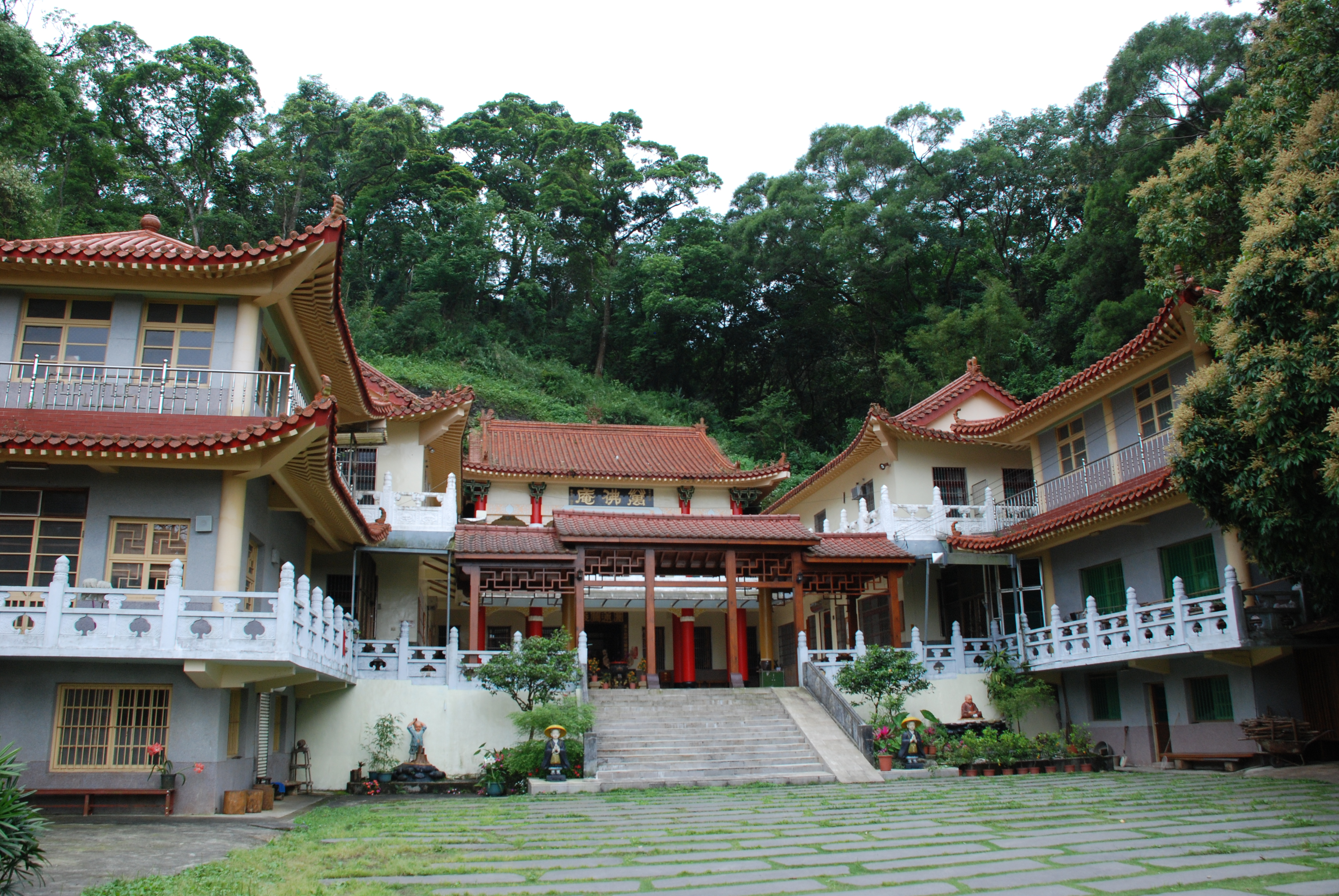 315, Taiwan, 新竹縣峨眉鄉湖光村